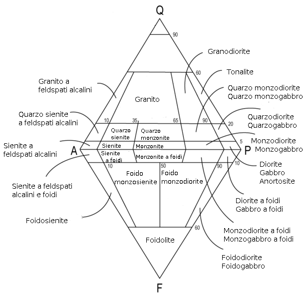 Diagramma QAPF per la classificazione delle rocce plutoniche.